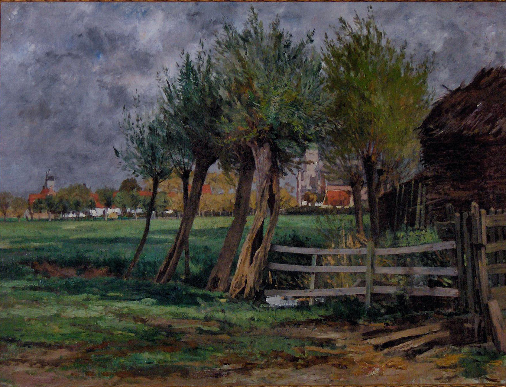 "Plattelandsgezicht", schilderij door Rodolphe Wytsman (1860-1927); gemeentelijk patrimonium Knokke-Heist, België